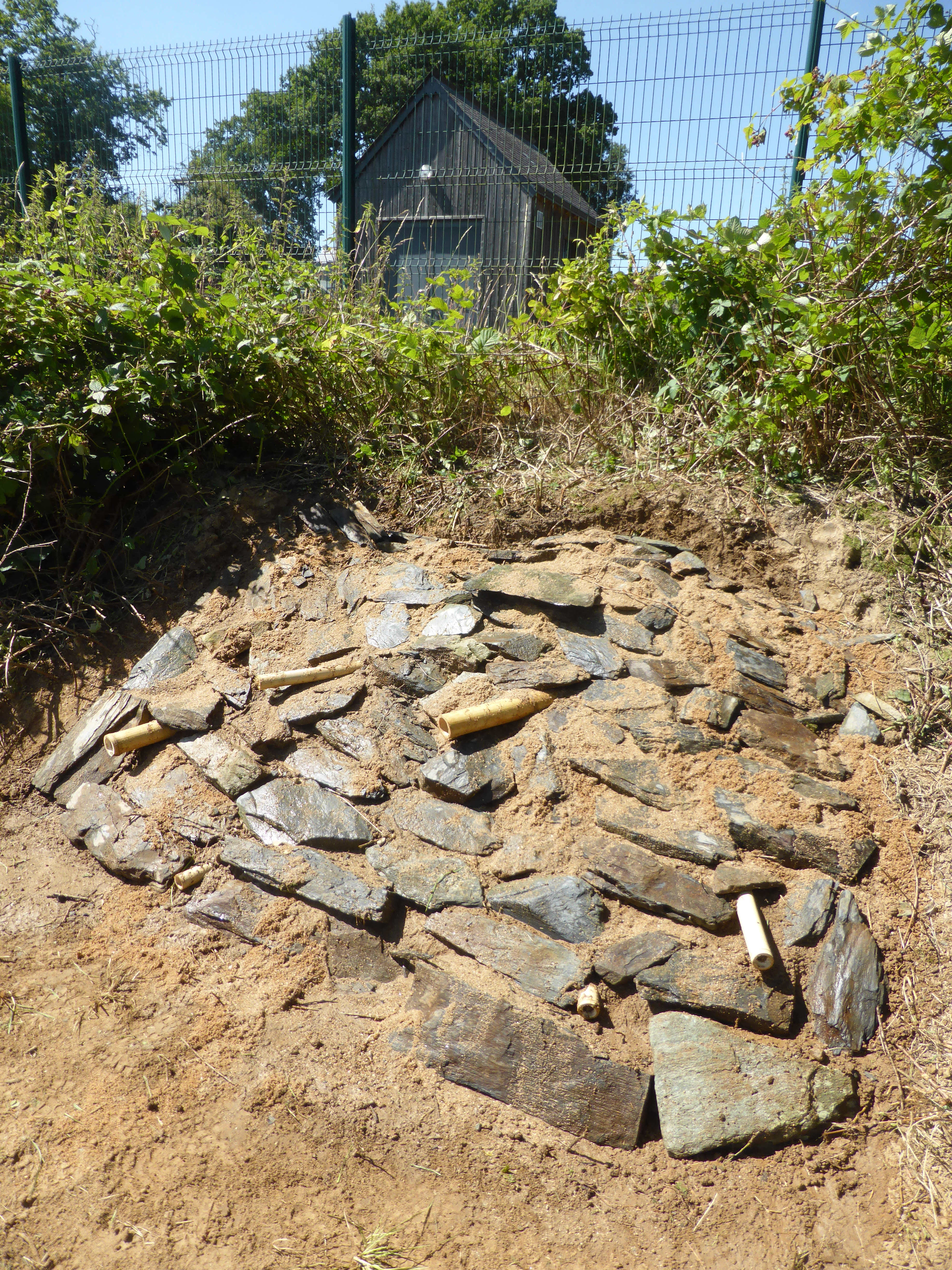 Abri à lézard ou hibernaculum construit à Vitré par l'association Vitré-Tuvalu